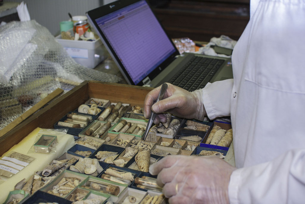 Collections du museum d'histoire naturelle de Bordeaux